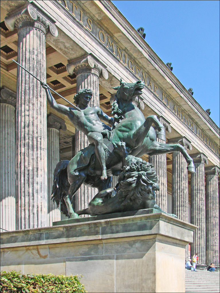 Bronze d'inspiration antique montrant le combat d'un cavalier et d'un lion, situé à l'entrée de l'Altes Museum Le bâtiment de l'Altes Museum (ancien musée) a été construit entre 1823 et 1828 face au Château par Karl Friedrich Schinkel dans un style néoclassique, avec une colonnade ionique, pour abriter la collection d'art de la famille royale prussienne. Il a ouvert ses portes au public en 1830. La rotonde originale se réfère au Panthéon de Rome. Elle était invisible depuis l'extérieur car elle ne devait pas entrer en compétition avec le dôme de la cathédrale voisine. (extrait de Wikipedia) L'Altes Museum se trouve sur l'île des musées, il présente des collections d'antiquités grecques, étrusques et romaines. Article Wikipedia sur l'Altes Museum (Berlin) site officiel Le projet Museumsinsel (parcours continu dans les musées de l'île)